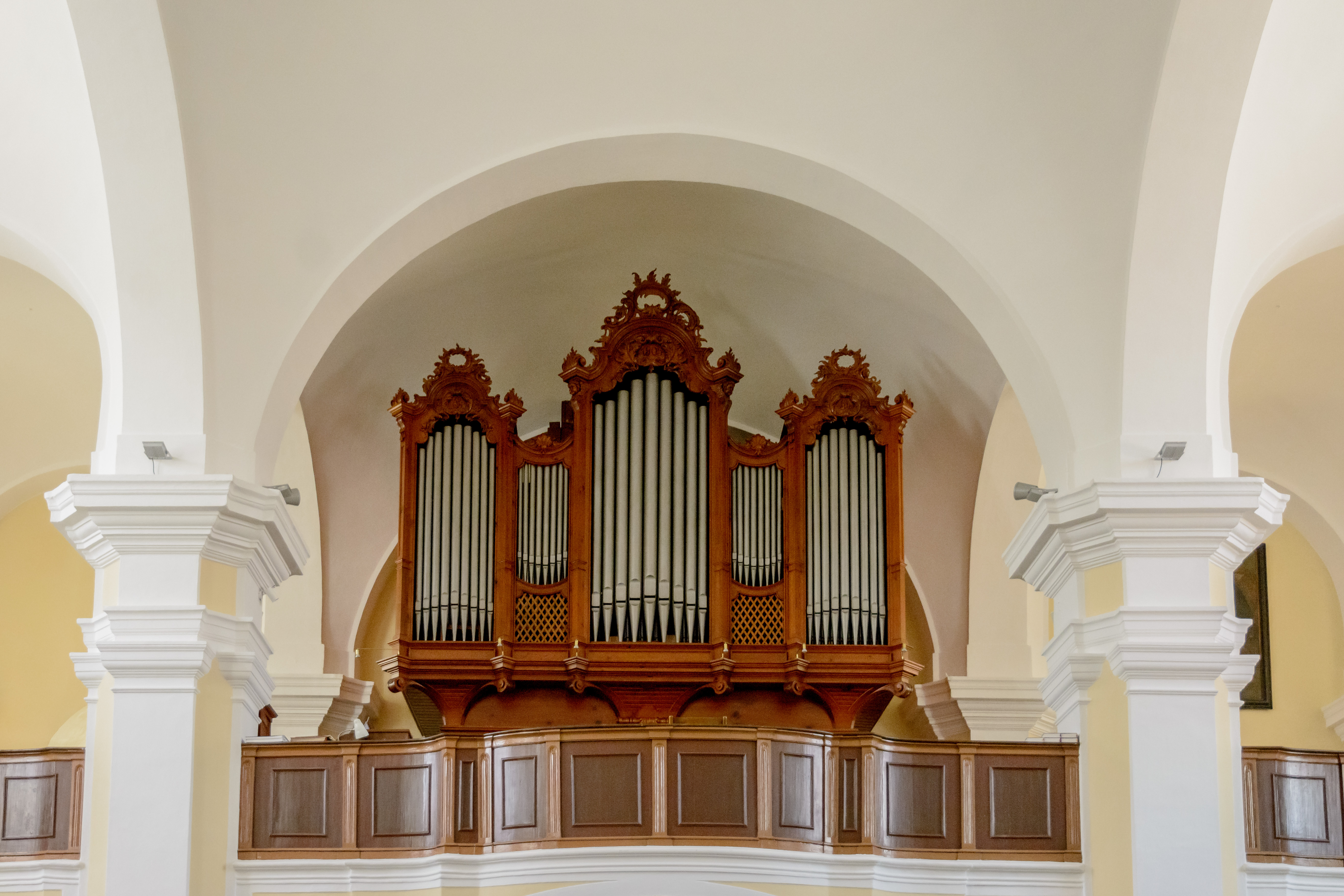 Kath. Pfarrkirche Mariae Himmelfahrt